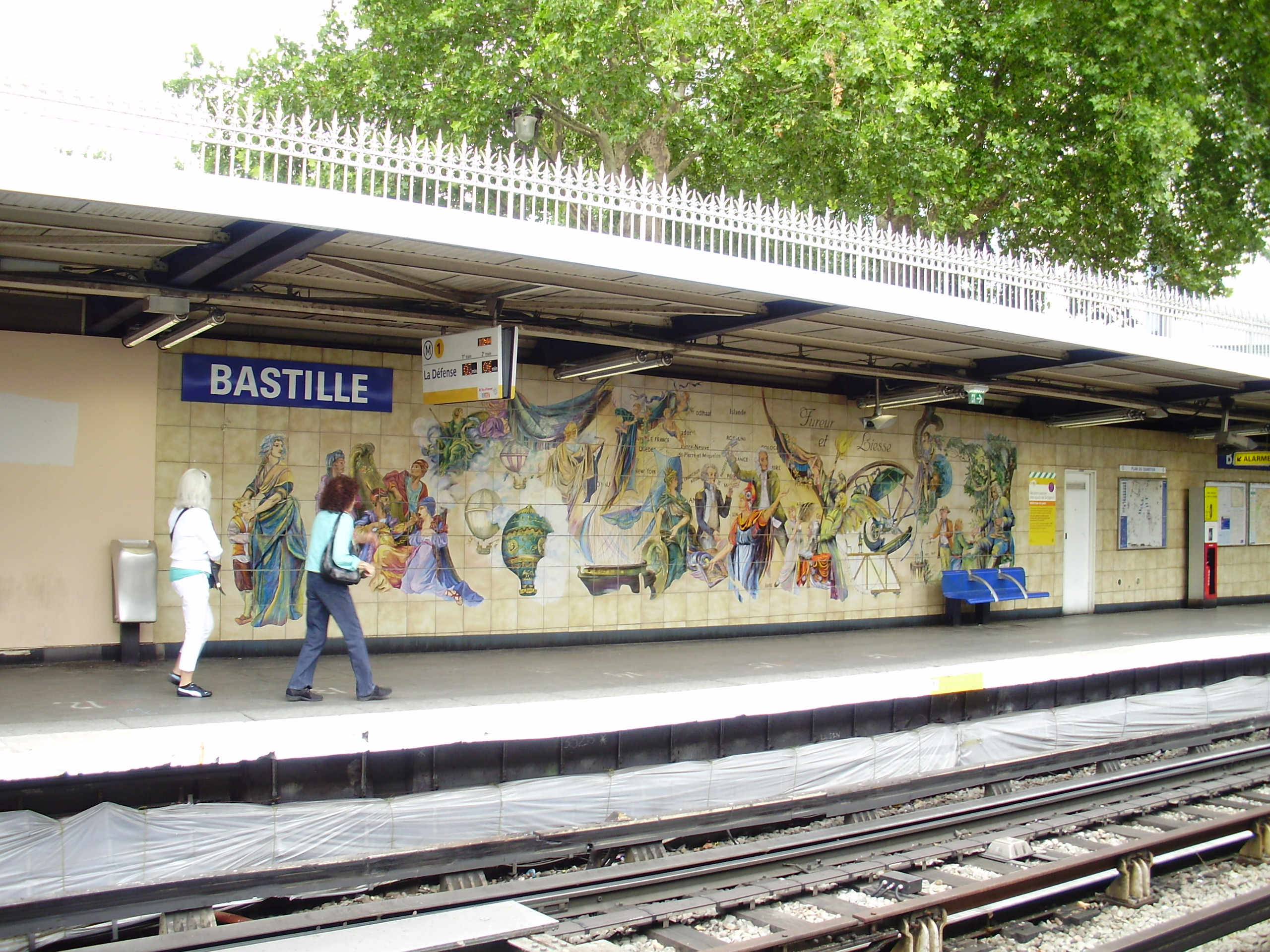 Fresque sur le quai de la station Bastille (ligne 1) du métro de Paris, France